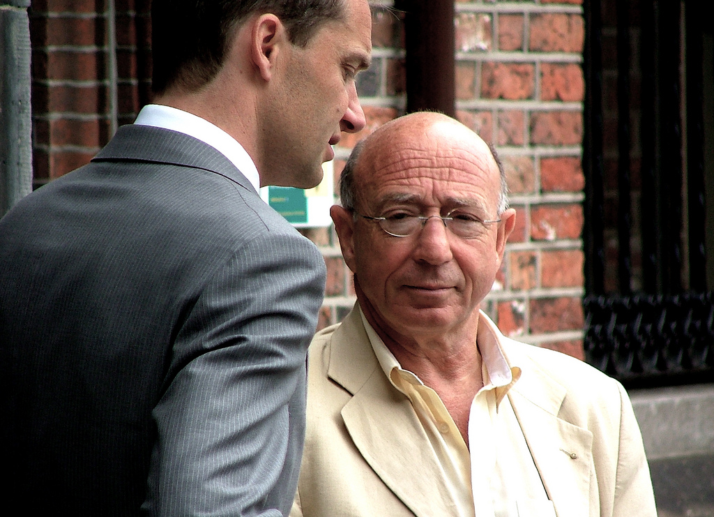 Hans Knoop. Foto gemaakt voor het Binnenhof Den Haag, was een toevallige ontmoeting